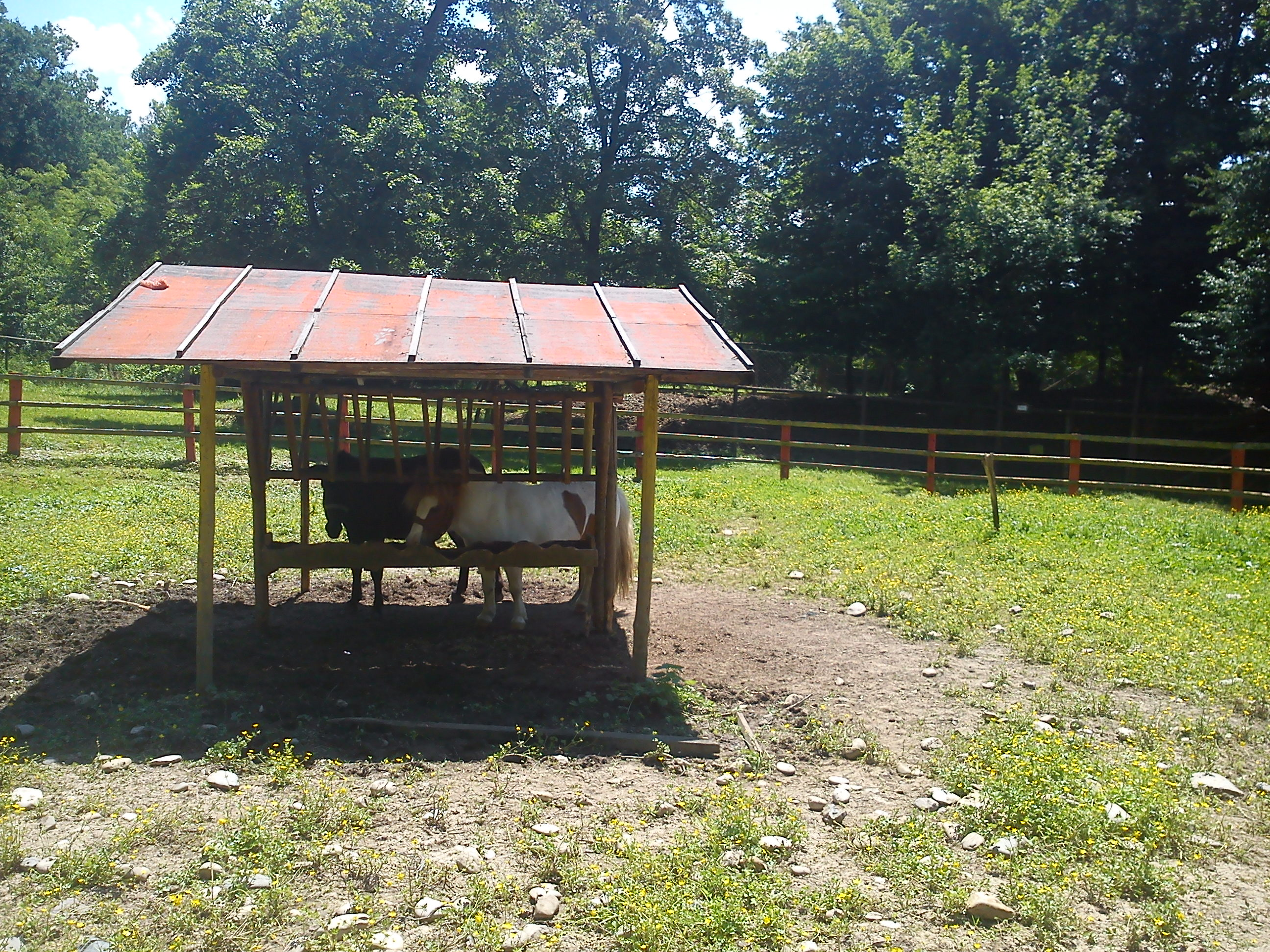 Конњи у ЗОО врту Бања Лука